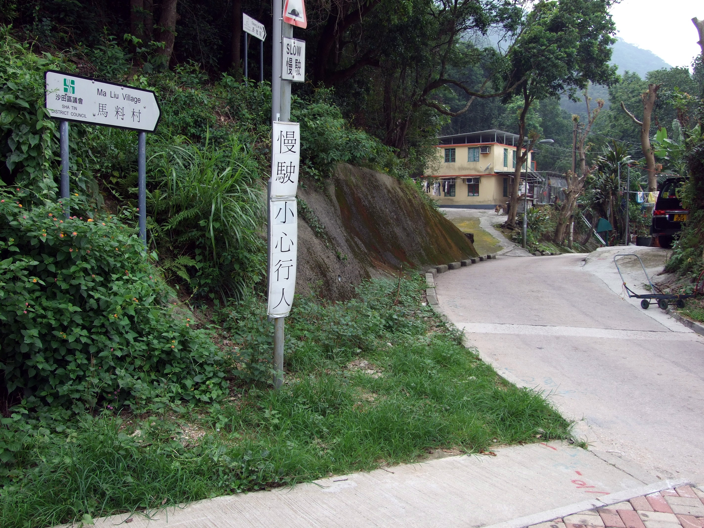 中文（香港）: 馬料村村外路牌